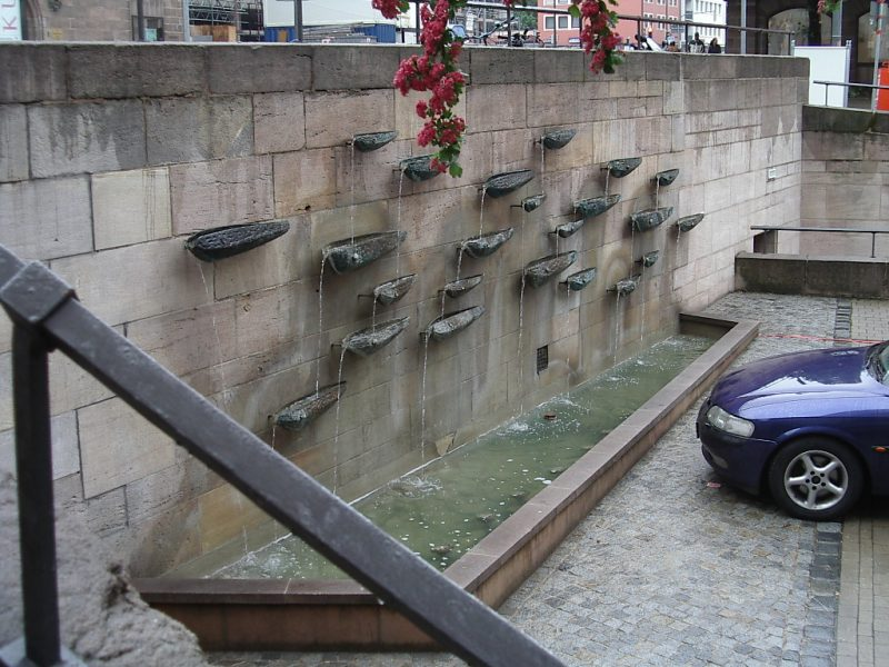 Nürnberg, Wandbrunnen am Fünferplatz, um 1960, v. SW (2004-05-11).